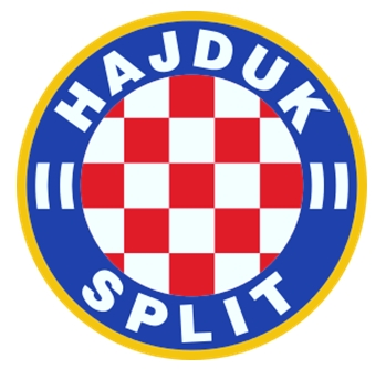 Ovo je grb kluba Hajduka Splita